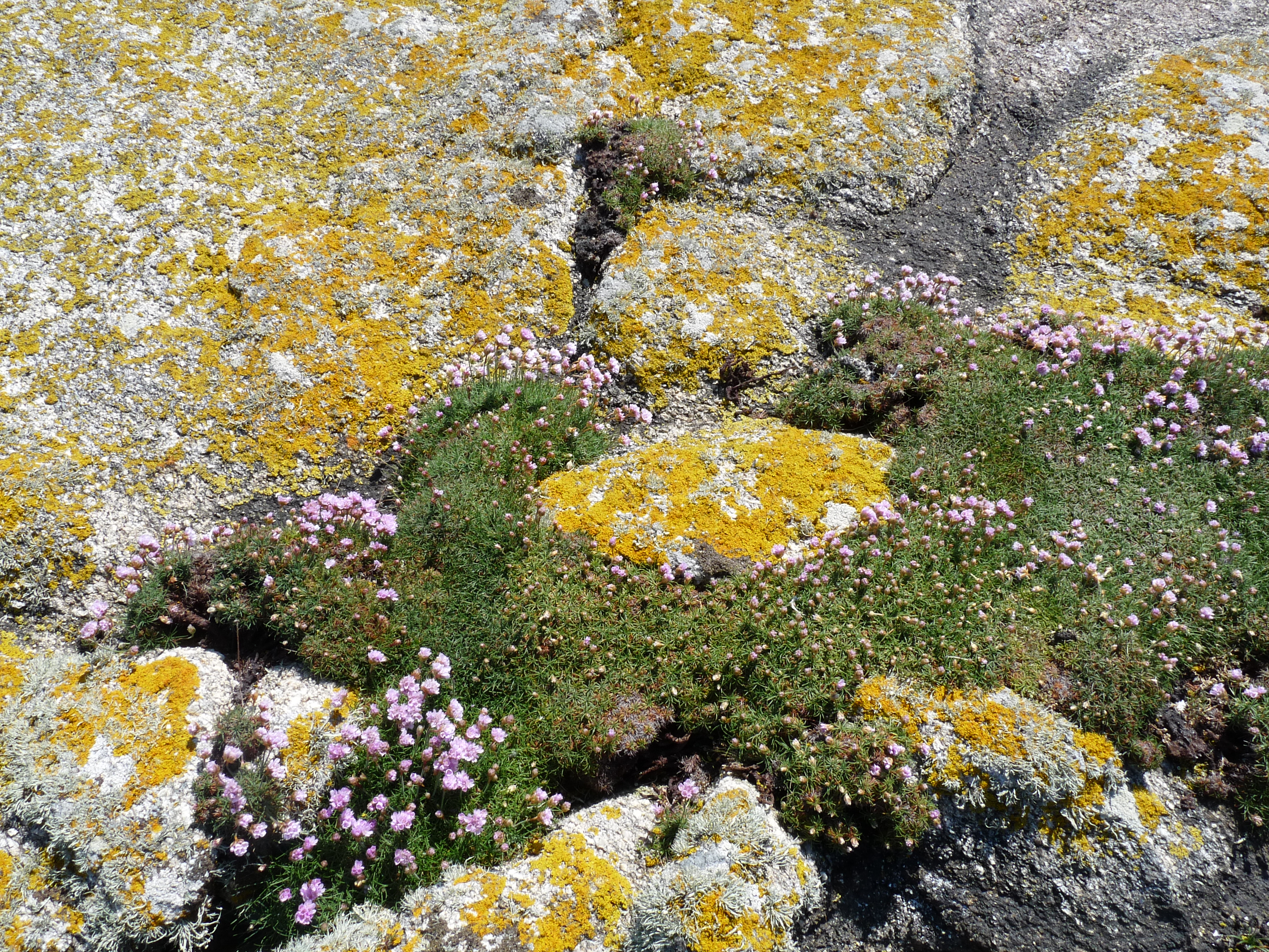 Tapis végétal au printemps à l'île de Sein (Finistère, Bretagne)